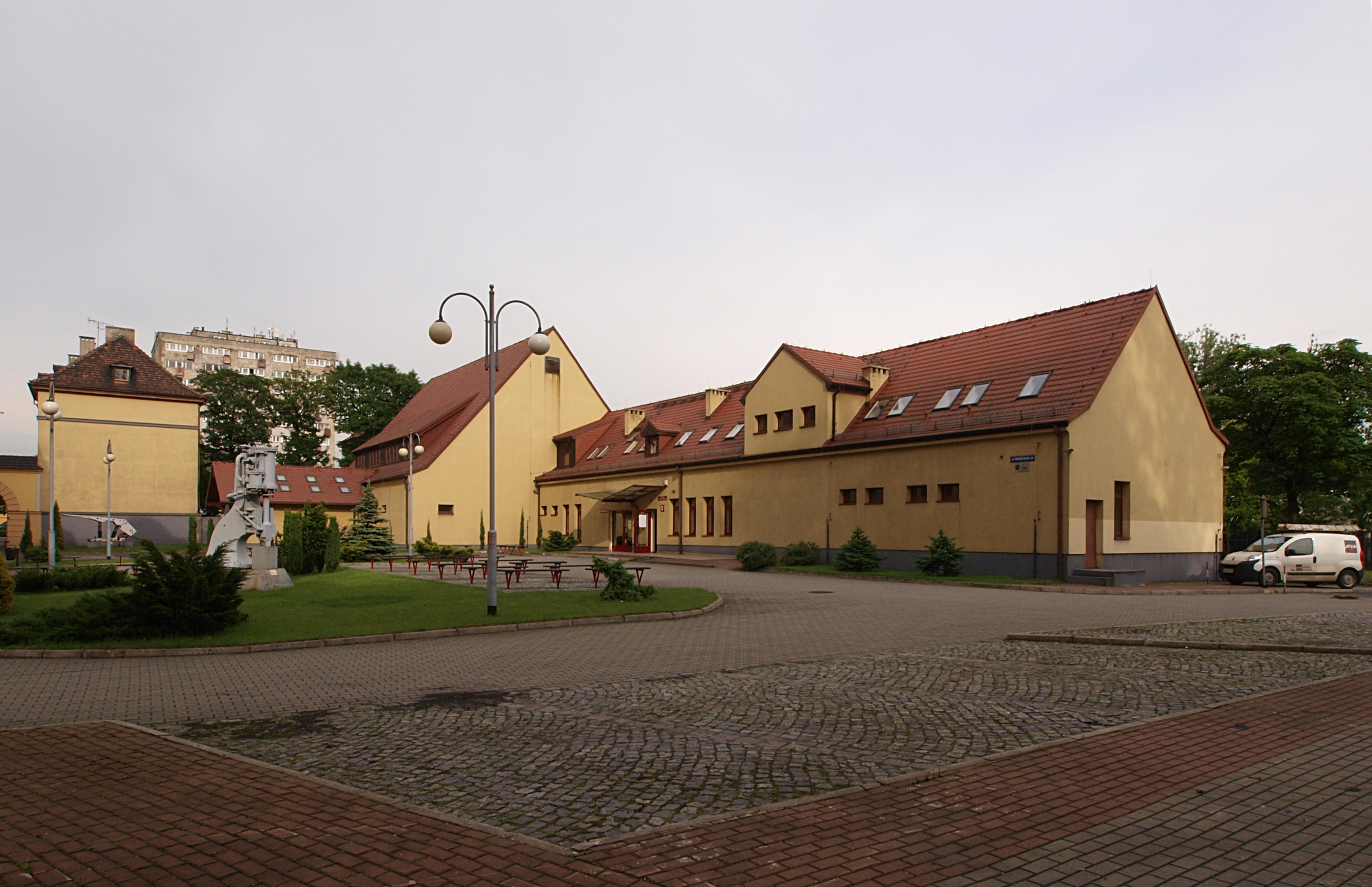 Ulica Roosevelta w Zabrzu. Budynek D Wydziału Organizacji i Zarządzania Politechniki Śląskiej.